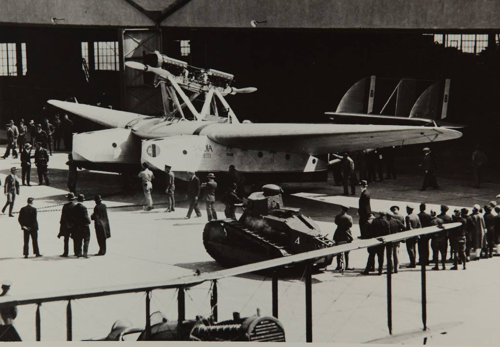 Savoia Marchetti S.55